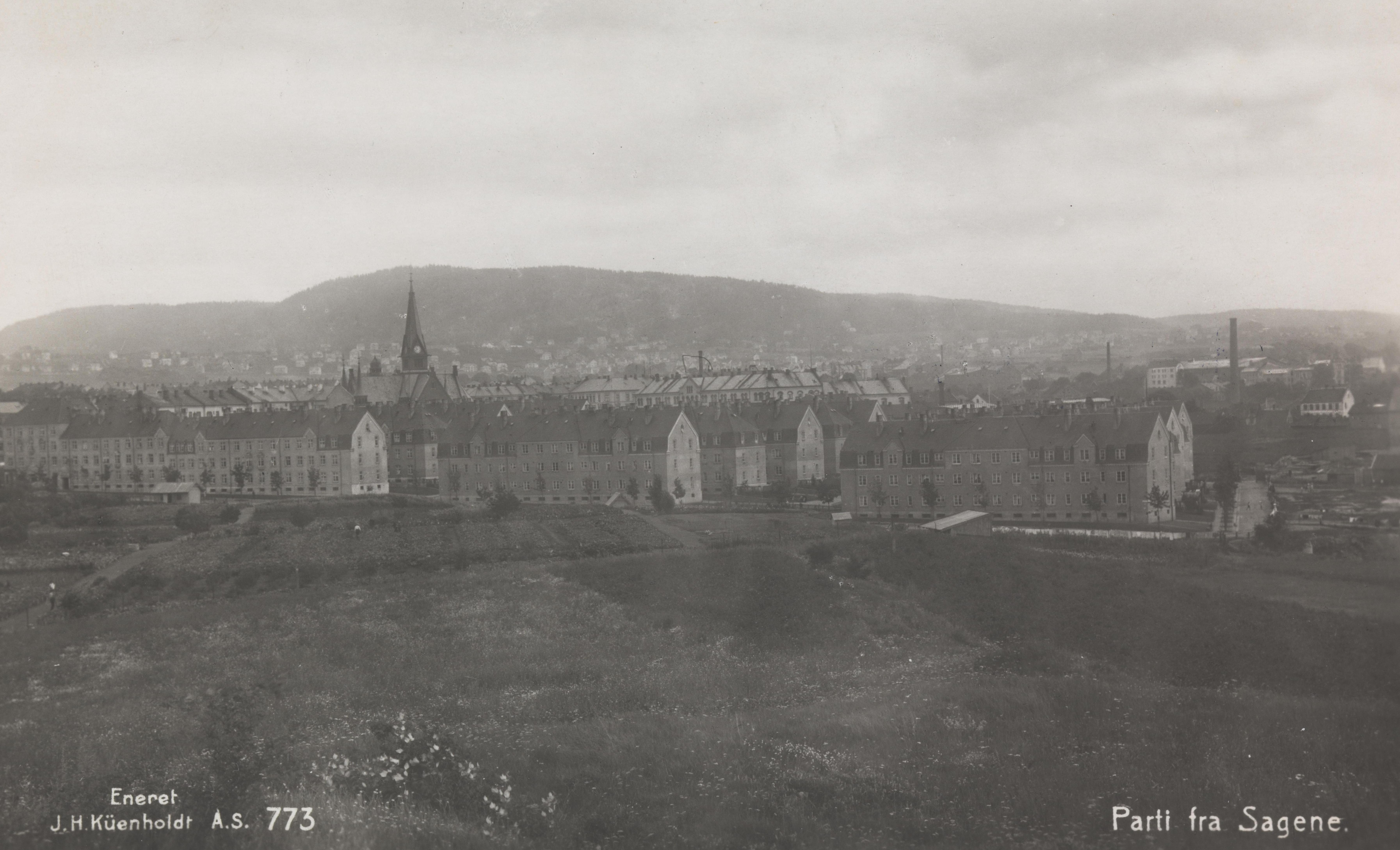 Bildet er hentet fra Nasjonalbibliotekets bildesamling Sagene, Oslo, Oslo